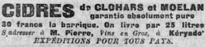 Publicité en faveur du cidre de Moëlan et Clohars-Carnoët parue dans le journal L'Ouest-Eclair du 27 mars 1914.